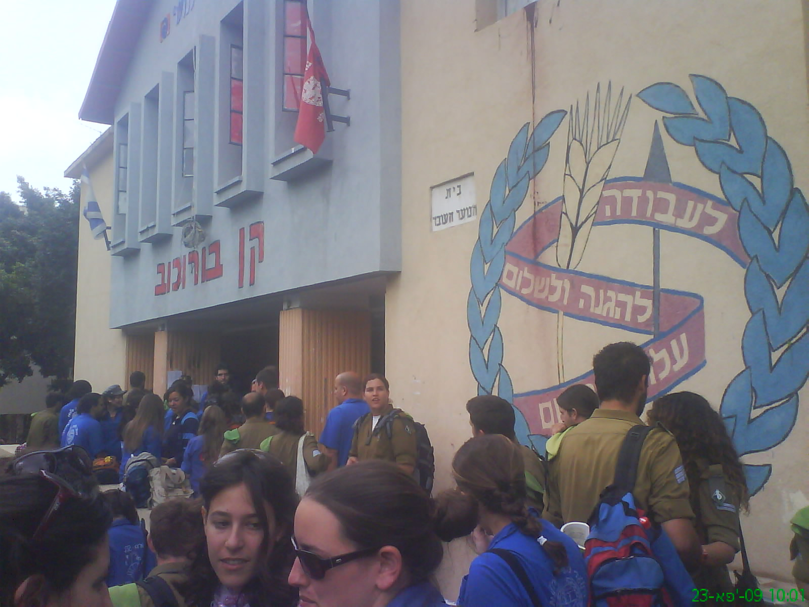 יום עיון בנושא מישנתו של בנימין זאב הרצל בקן בורוכוב לחברי תנועת הבוגרים של הנוער העובד והלומד